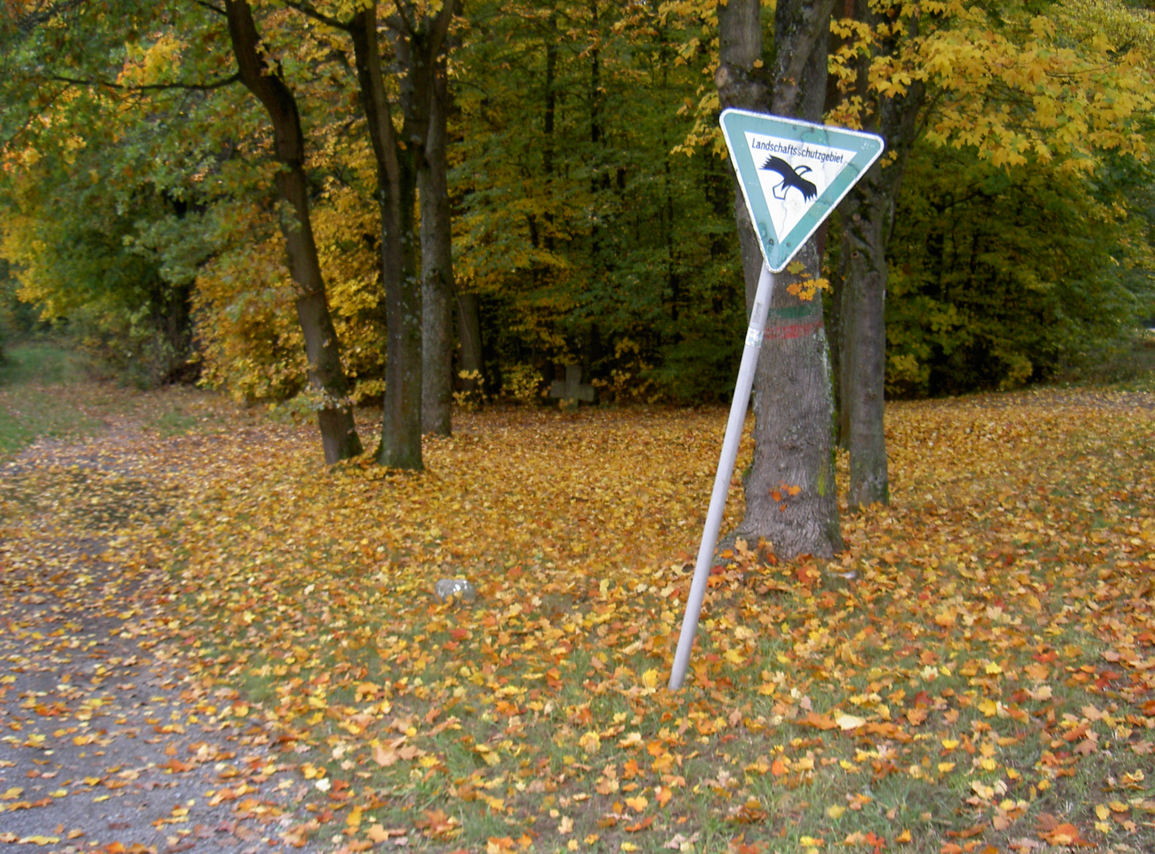 Zwei Steinkreuze Mooslohe (Weiden in der Oberpfalz)